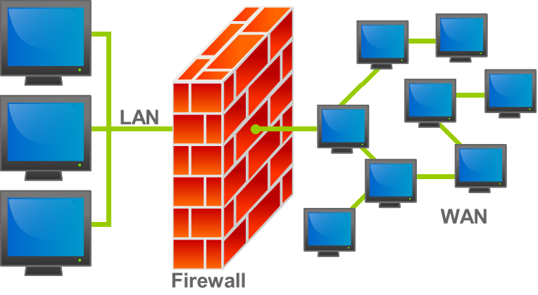 Simulação da participação de um Firewall entre uma LAN e uma WAN